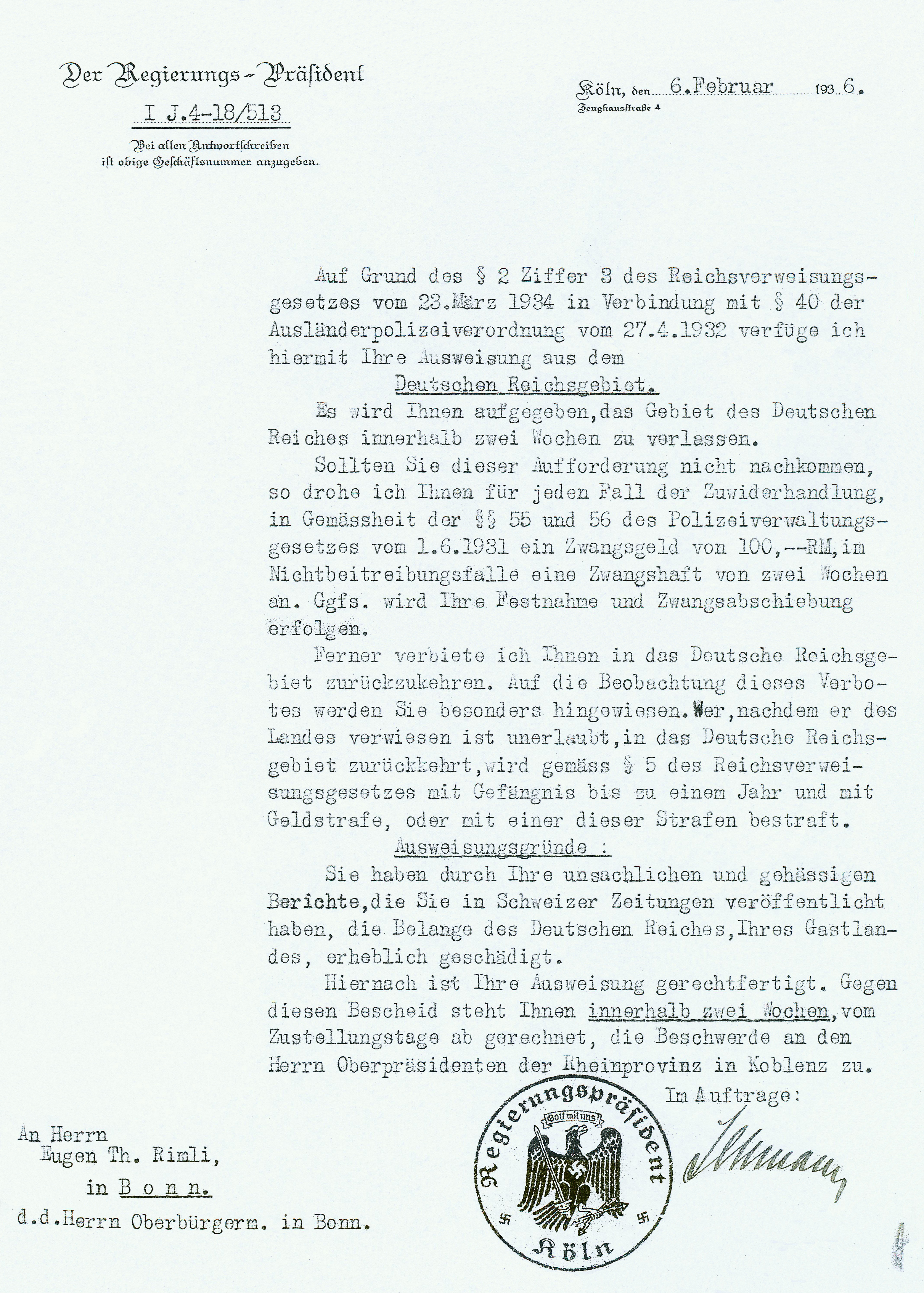 Ausweisungsverfügung für Eduard Theodor Rimli